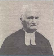 Félix Orsières, historian (1803-1870)